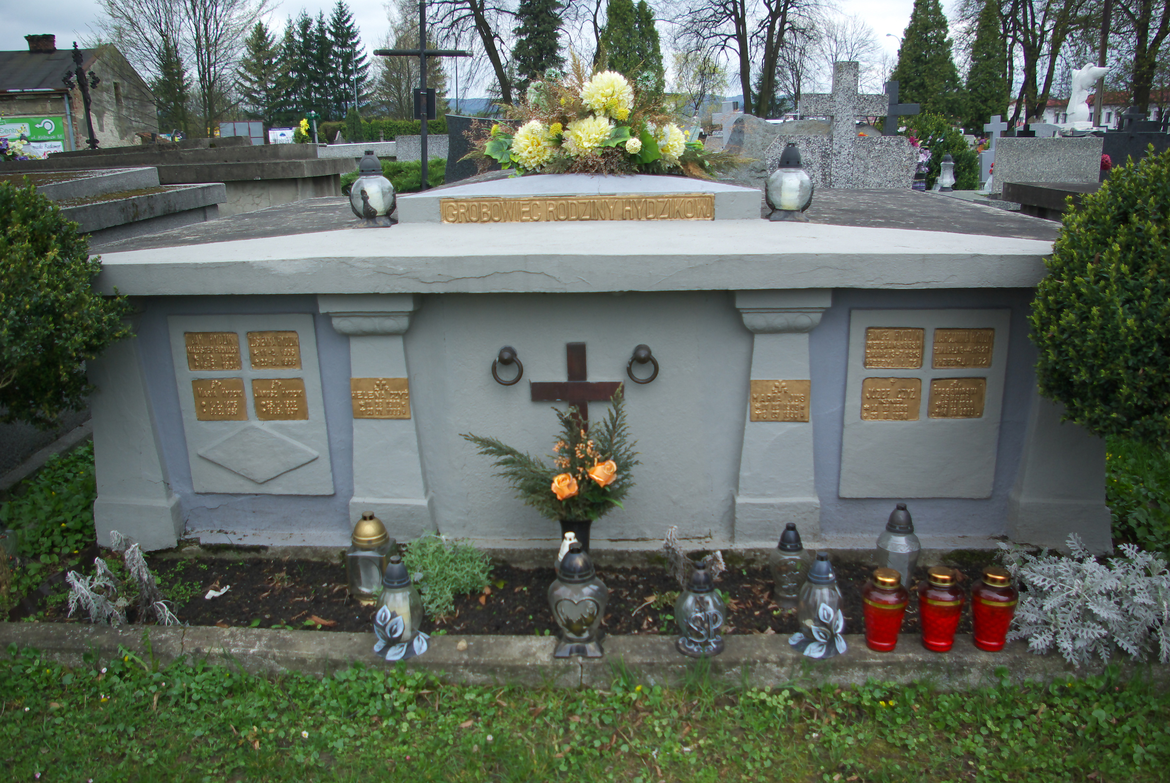 Grobowiec rodziny Hydzików na Cmentarzu Centralnym w Sanoku